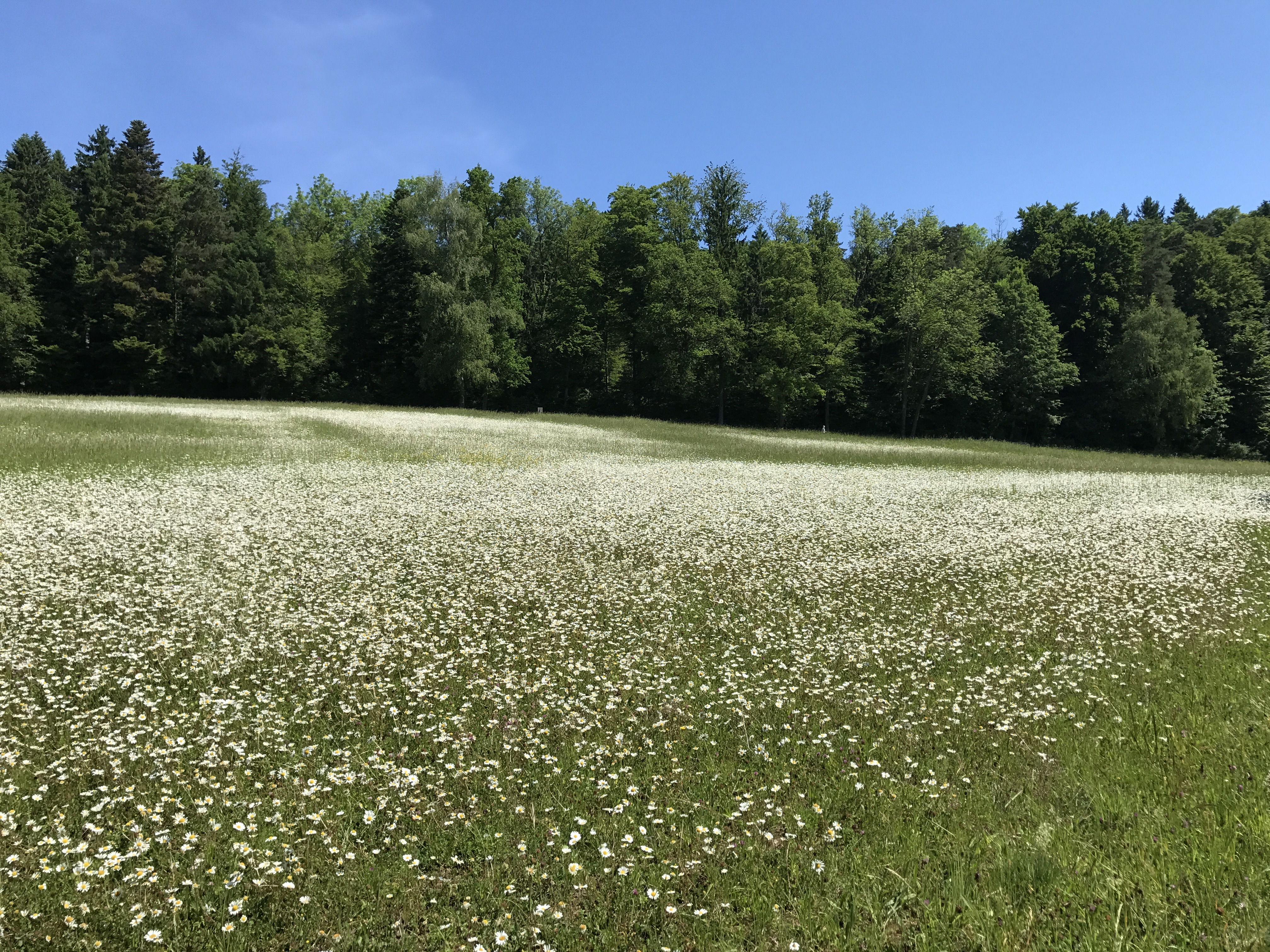 Margeritenwiese in der Küsnacht ZH